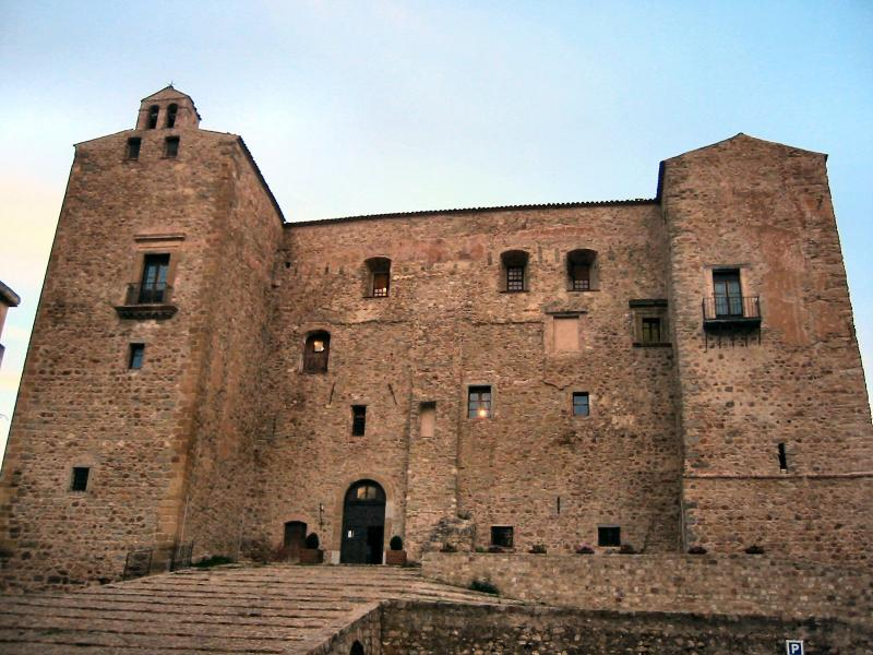 Castello dei Ventimiglia